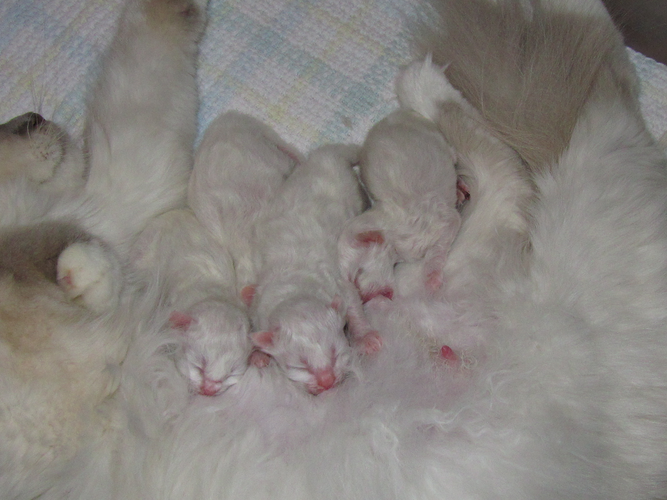 Les chatons naissent tout blanc.